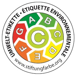 Umweltetikette C V2